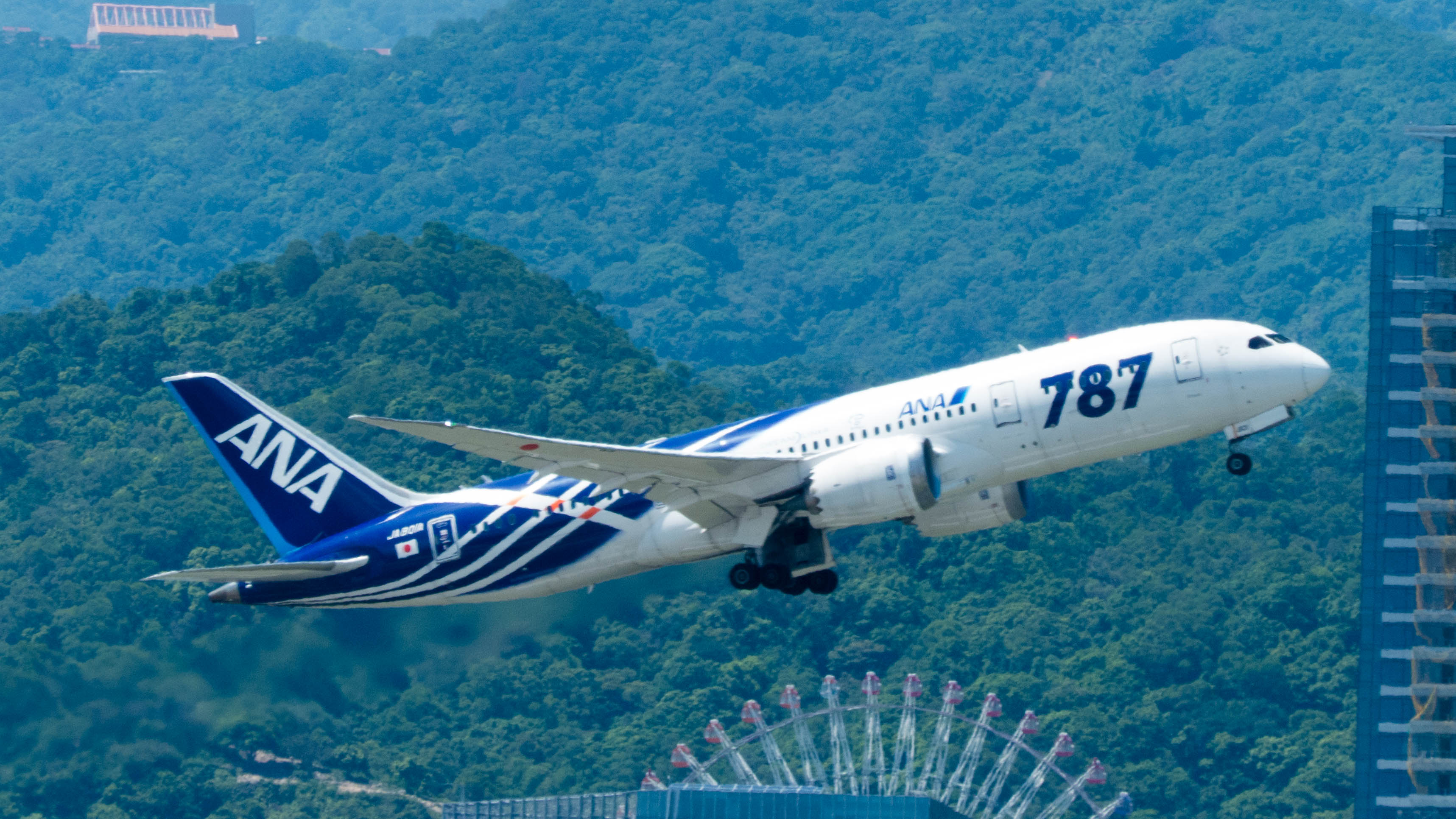 中文（台灣）: 從臺北松山機場起飛的全日空波音787-8 JA801A。